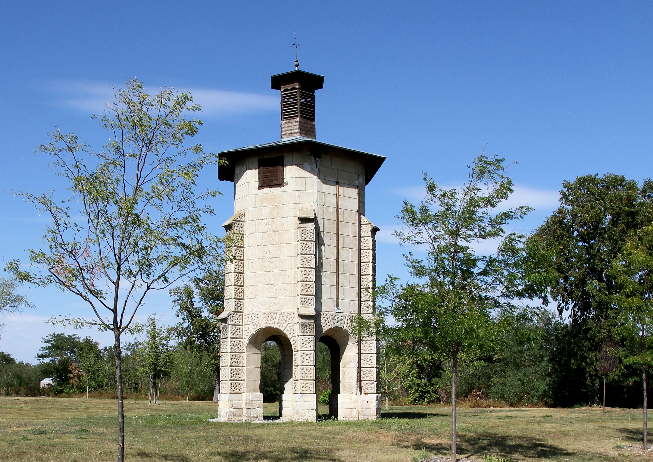 Wasserturm mit Glockentürmchen der Domaine Albrechtsfeld in der burgenländischen Gemeinde Andau.